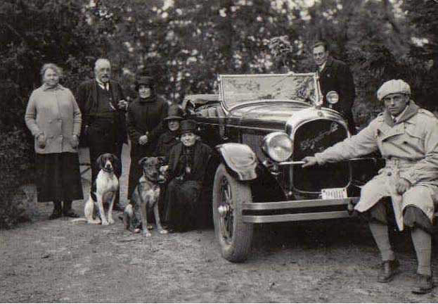 Memküll, Sommer 1929: Emilie und Alfred Woldemar August Alsleben. Ottilie (Tilly) Bindemann, Besitzerin von Memküll; Benita (Bitza) Bindemann, Besitzerin eines Grundstückes in Lansal (Livland); Wilhelmine (Minna) Bindemann. Stehend am Auto der Sohn Herbert Alsleben, vorn dessen Bruder, der Sportler Alfred Alsleben